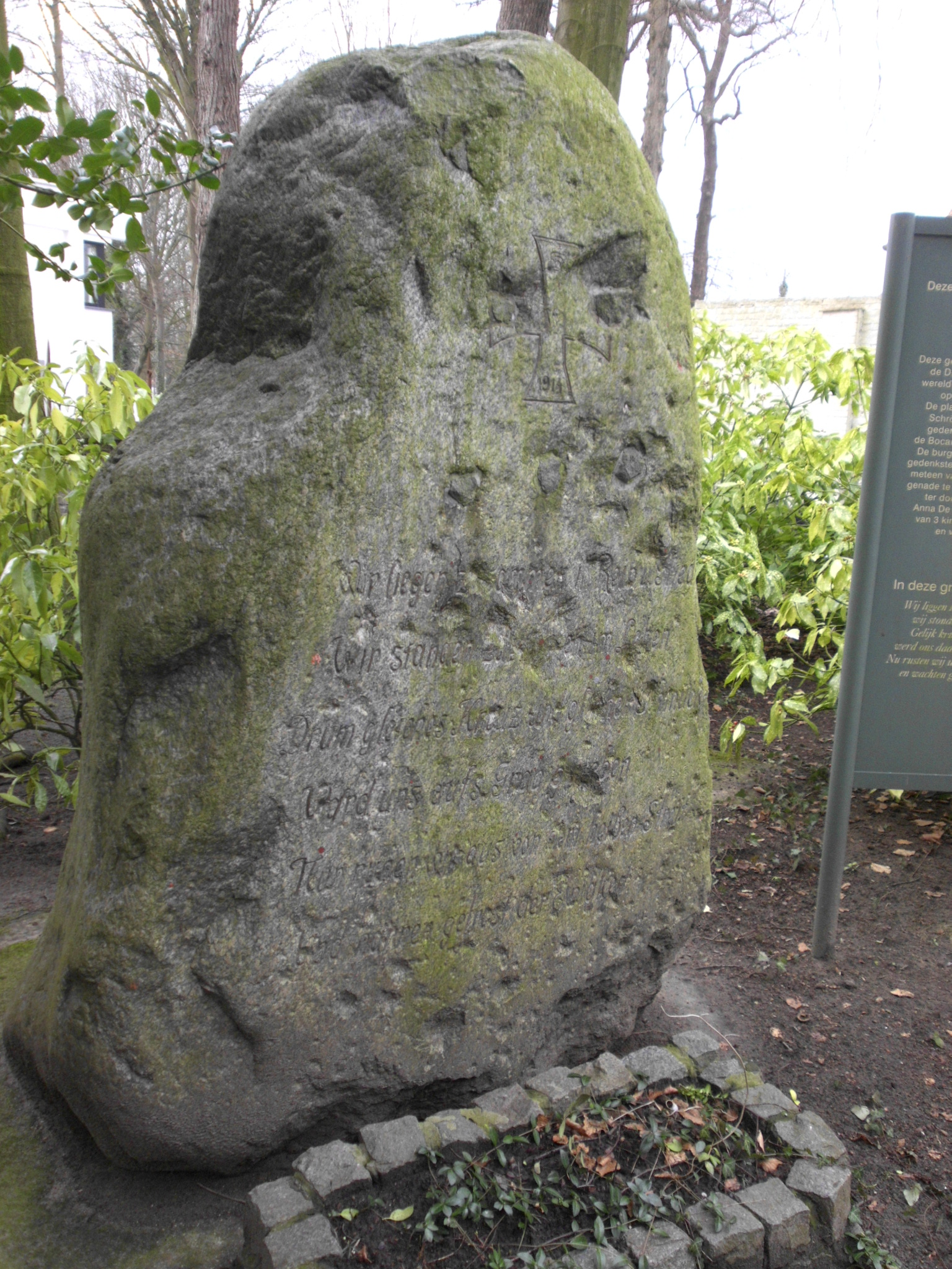 Duitse monoliet op de Centrale Begraafplaats (Brugge)